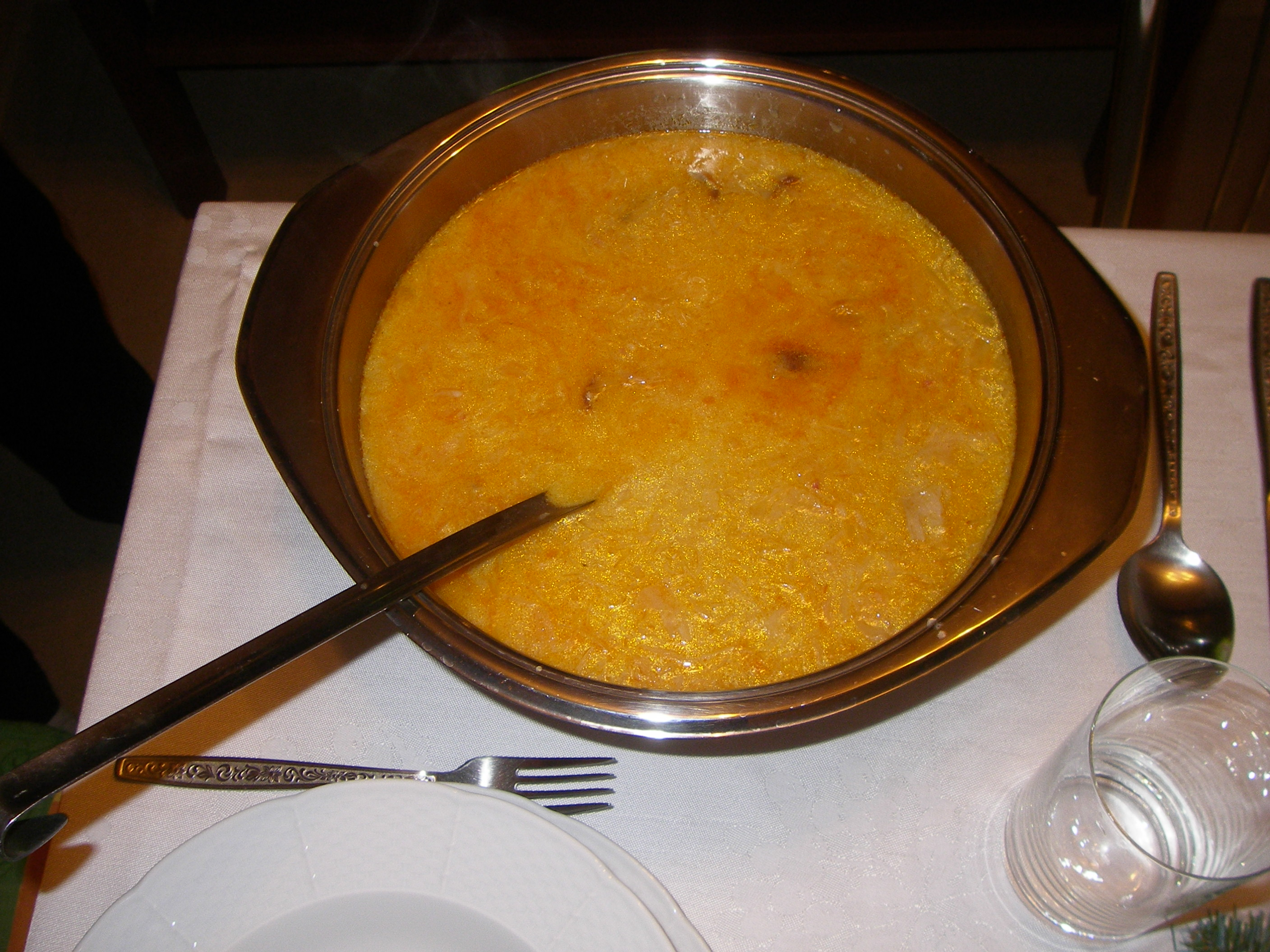 Kapustnica